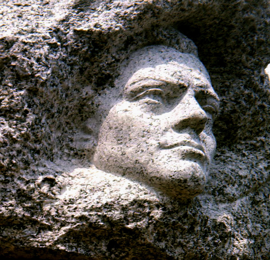 Jean Moulin. Monument d'Aix-les-Bains oeuvre de Marcel Mayer.